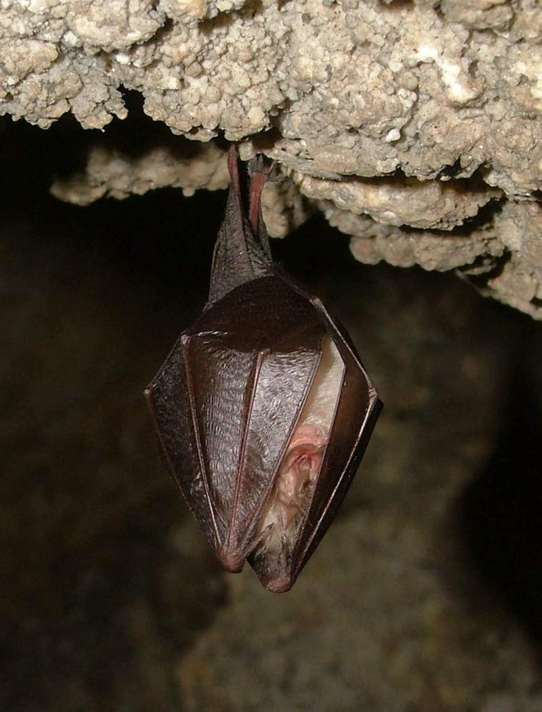 Patkósdenevér.